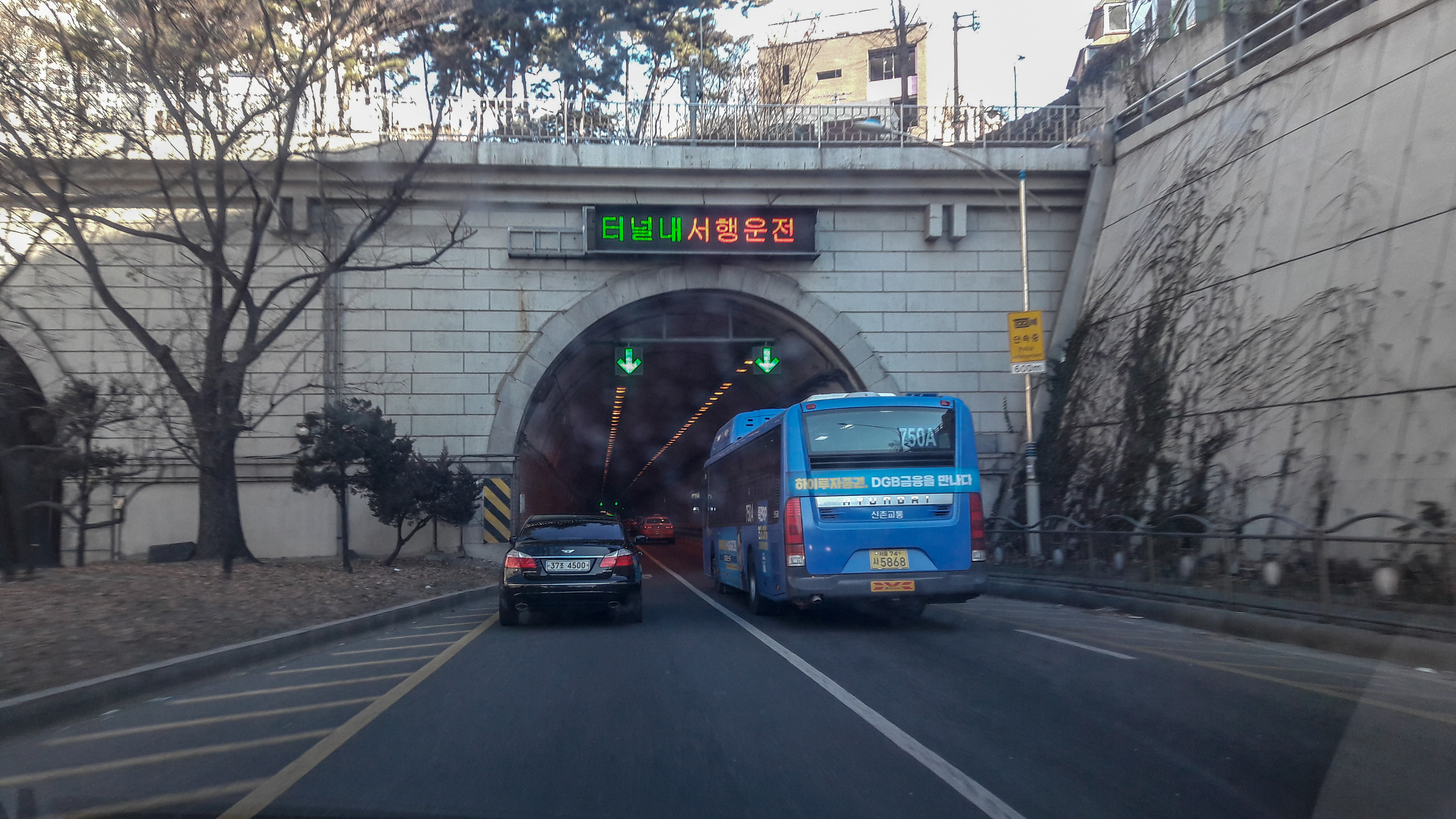 양녕로 상도터널 남측 입구